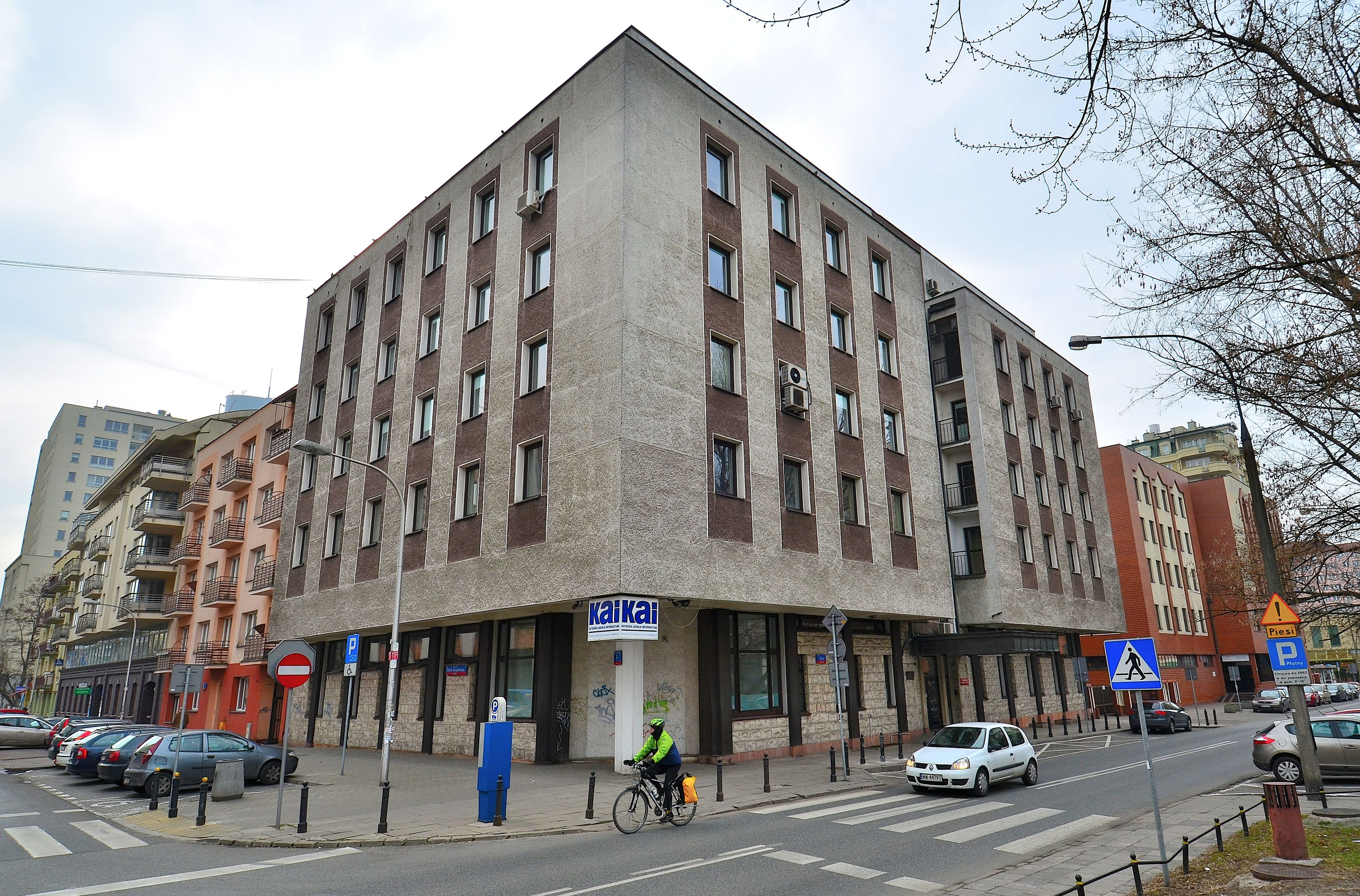 Siedziba Katolickiej Agencji Informacyjnej i Krajowej Rady Radiofonii i Telewizji przy na skwerze kard. Stefana Wyszyńskiego 9